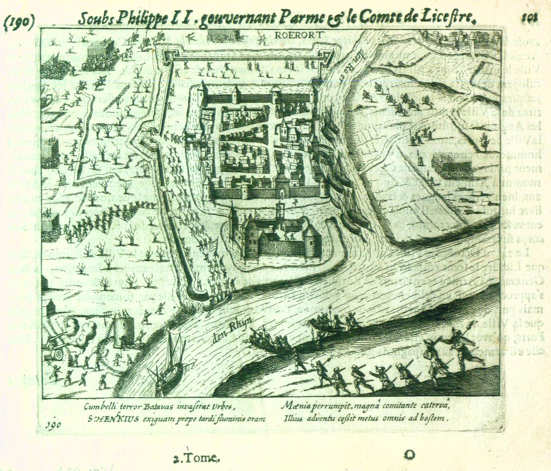 Kupferstich, das Ruhrort und das Kastell im Jahre 1587 zeigt. Ruhrort geht auf eine 1371 belegte Zollstelle auf dem "Homberger Werth", einer Insel in einer Rheinschleife, zurück. An das dort errichtete und nach 1636 geschleifte "Kasteel" erinnert nur noch der Name der Kasteelstraße. Östlich davon entstand im Mittelalter ein ab 1437 mit Mauern und vier Stadttoren befestigter Ort nahe der Ruhrmündung: Ruhrort. Von dieser mittelalterlichen Stadt blieben nach der ab 1962 durchgeführten Flächensanierung nur Straßennamen übrig. Der Stich von Franz Hagenberg zeigt die Eroberung Ruhrorts durch die Spanier im Jahre 1587. Die Darstellung von Befestigungen, Stadtmauer und Straßenführung entspricht nicht der Wirklichkeit. In den letzten Jahrzehnten fand man Reste des Kastells in Kellern Ruhrorter Gebäude. Ruhrort ist ein Stadtteil von Duisburg.